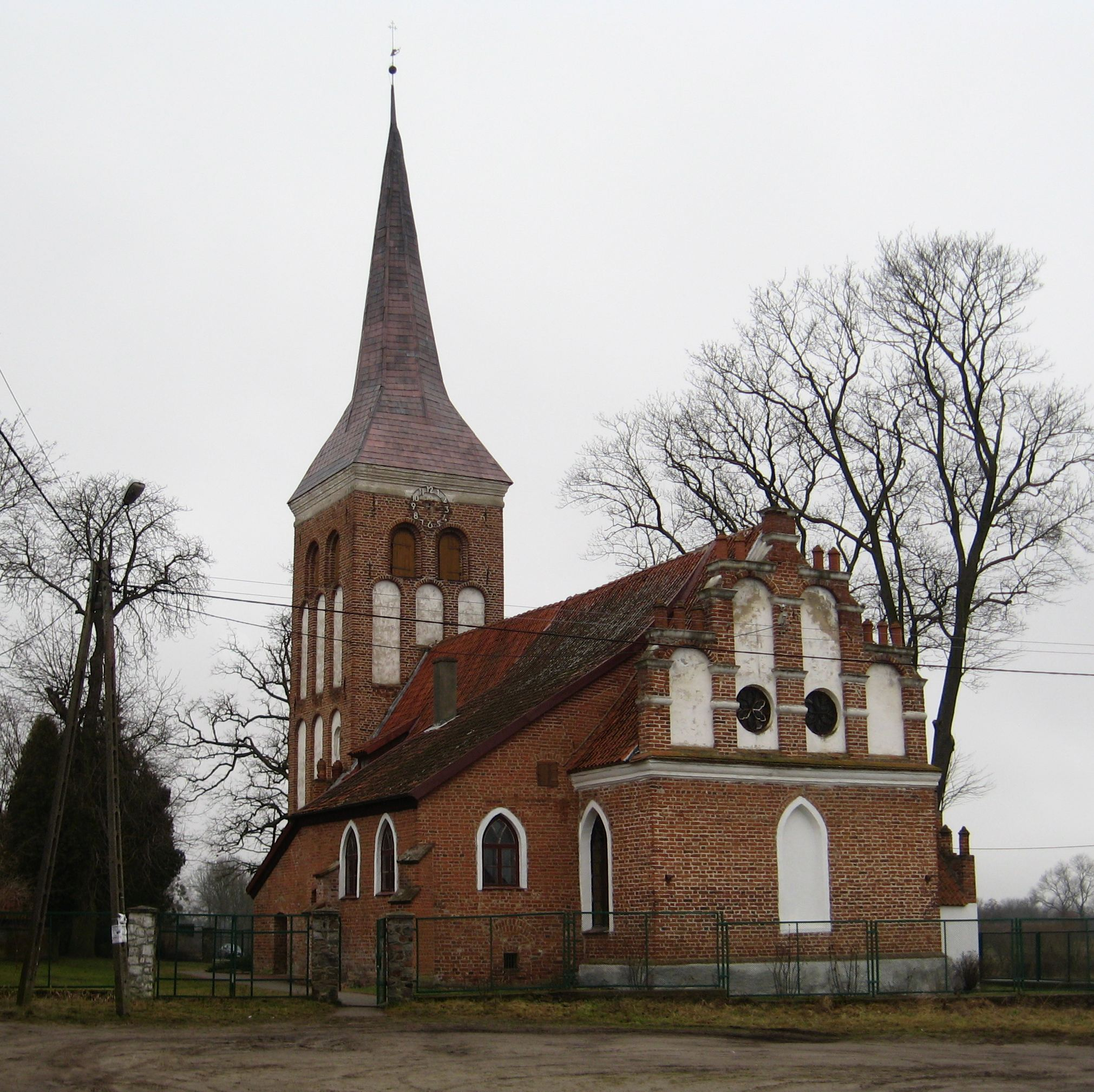 Church Drogosze (Groß Wolfsdorf) in Poland - OpenStreetMap (Info)